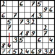 Sudoku